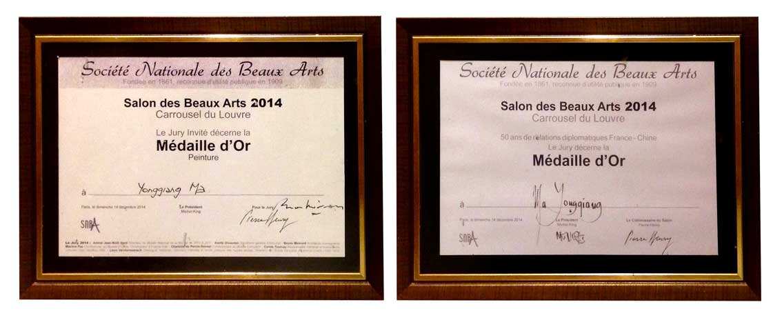 Piagam penghargaan yang diterima Sidik dari Louvre Internationals Arts, Prancis